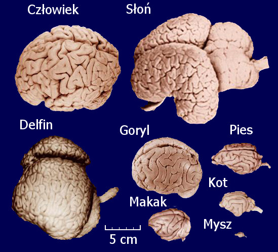 Porównanie wielkości mózgów, tłumaczenie z commons.